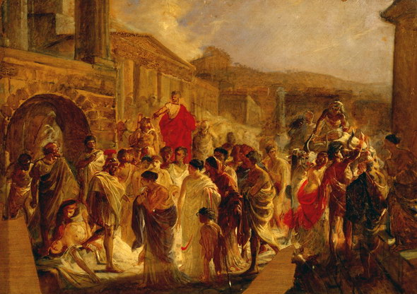 Ге Николай. Смерть Виргинии. 1857 Эскиз неосуществленной картины. 1857-1858. Холст, масло. 43 х 57. Сюжет взят художником из истории Античного Рима. Децемвир Аппий Клавдий, один из коллегии десяти законодателей, воспылал тайной страстью к дочери уважаемого центуриона. Он задумал хитростью овладеть ею и сговорился с одним из тех, кто от него зависел, что тот заявит, будто девушка эта ранее была рабыней, и приведет обвиняемую к Аппию, который вынесет приговор в пользу своего сообщника. Но прежде чем ее увели, явившийся отец Виргинии схватил в лавке мясника нож и заколол ее. Эскиз неосуществленной картины.